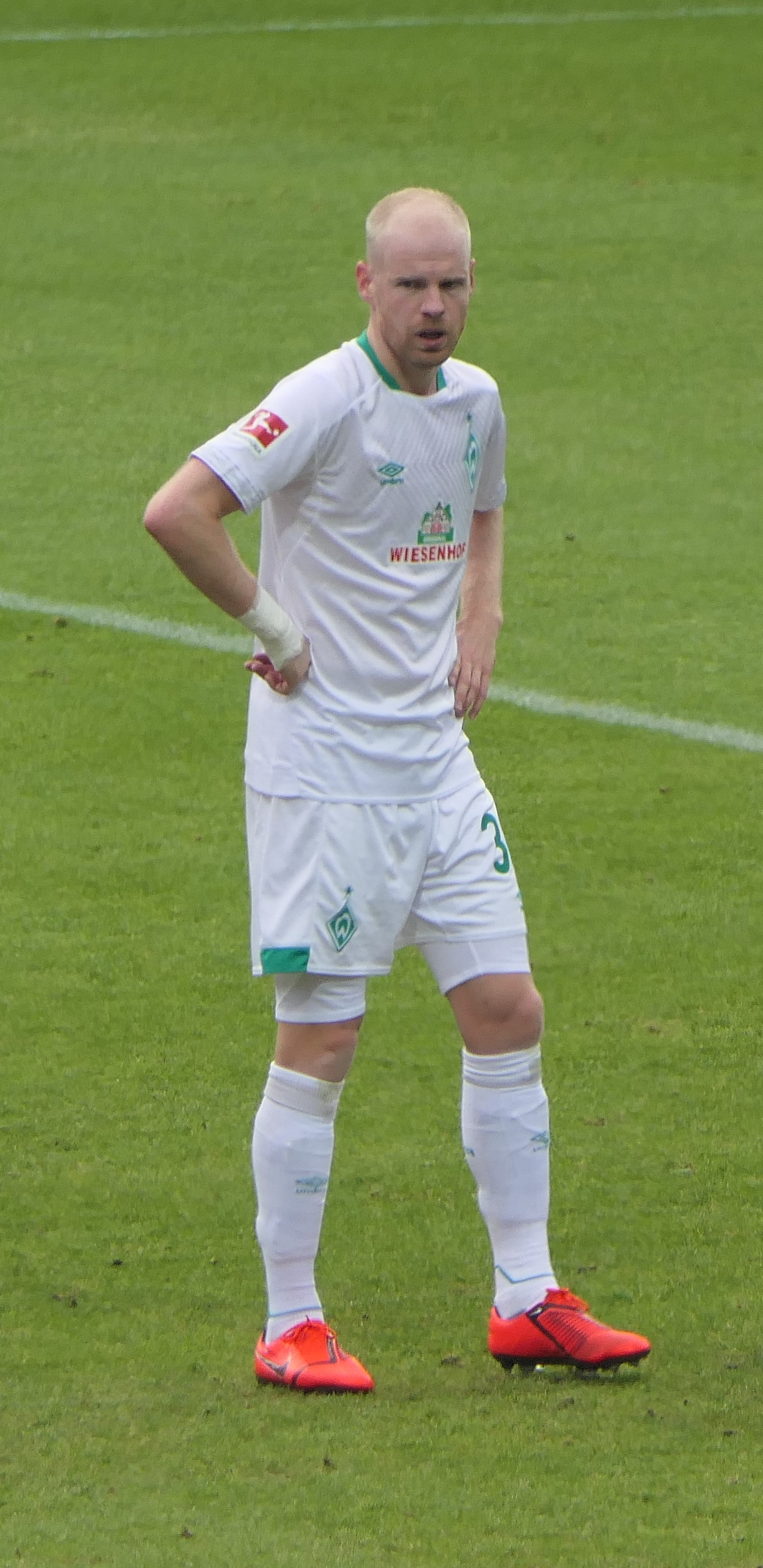 Der Fussballprofi Davy Klaassen im Trikot vom SV Werder Bremen beim Auswärtsspiel gegen den 1.FC Nürnberg am 02.02.2019.